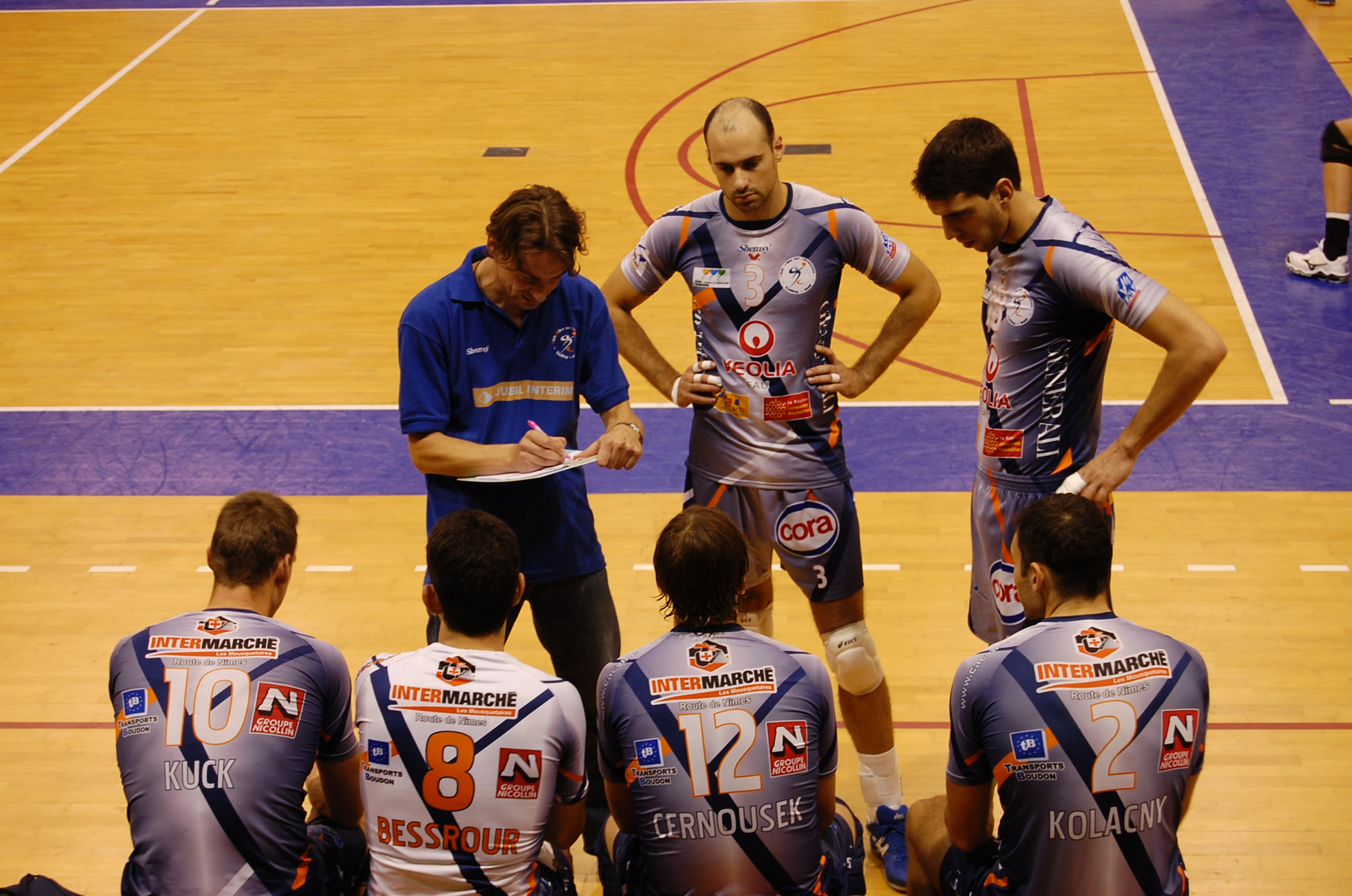 Equipe de volley d'Alès en Cévennes Volley-Ball, championnat de France de ligue A, saison 2009/2010 durant un temps mort. Luc Marquet, l'entraîneur donne des consignes à ses joueurs.